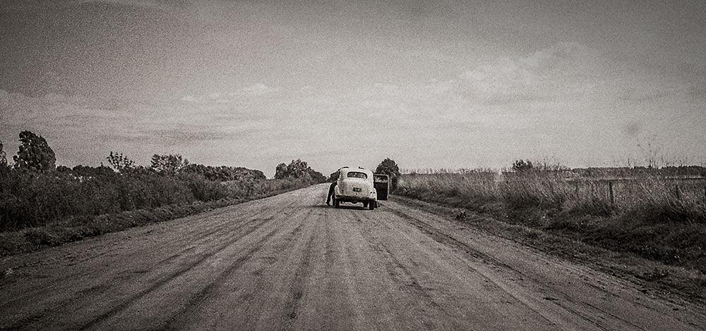 Foto tomada en 1974, perteneciente a la serie Rio Cuarto.